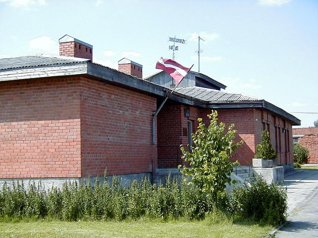 Ziru pagastnams 2002-07-10